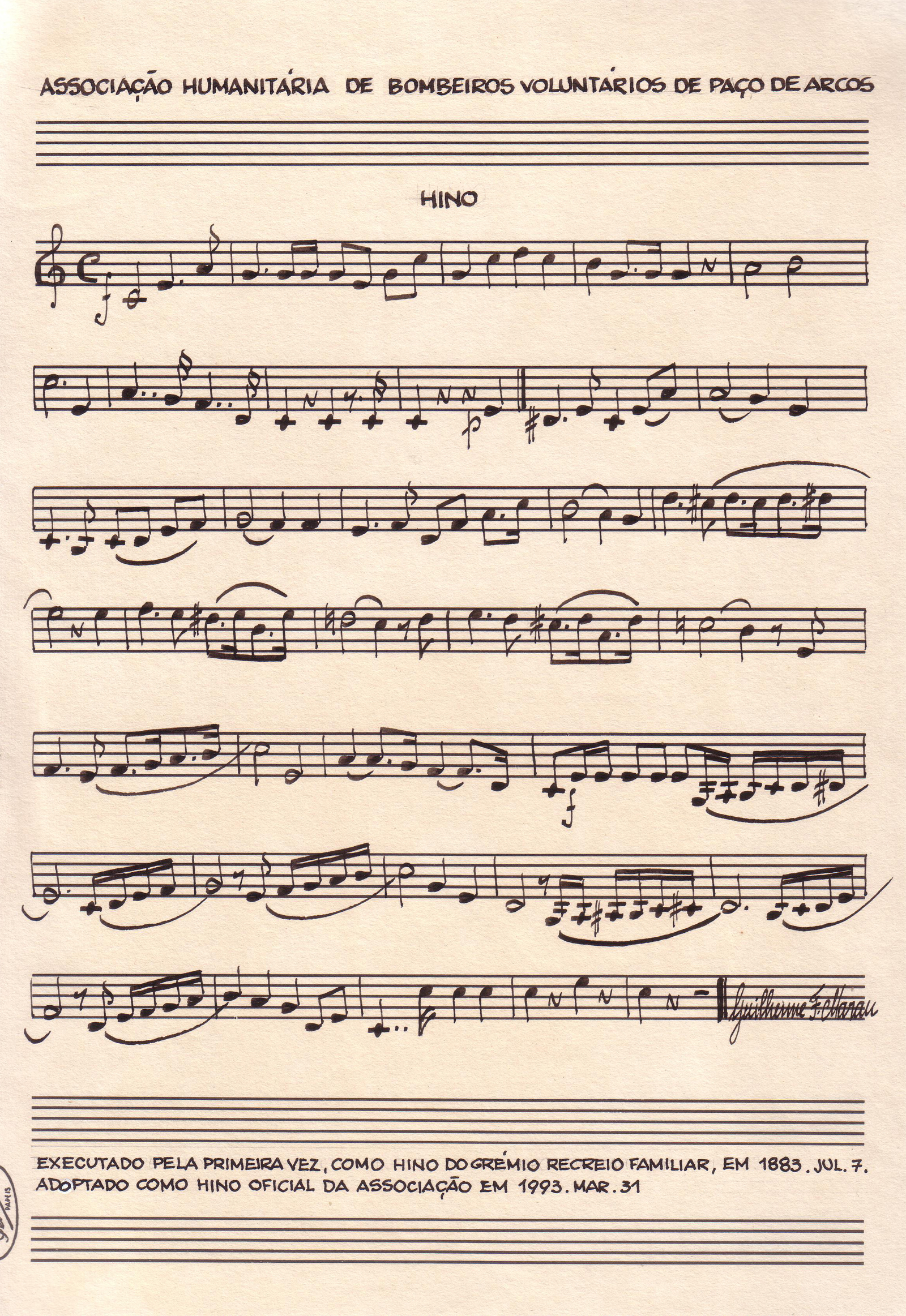 Hino da Associação Humanitária de Bombeiros Voluntários de Paço de Arcos. Paço de Arcos, Oeiras, Portugal. Reza a legenda: "EXECUTADO PELA PRIMEIRA VEZ, COMO HINO DO GRÉMIO RECREIO FAMILIAR, EM 1883. JUL. 7. ADOPTADO COMO HINO OFICIAL DA ASSOCIAÇÃO EM 1993. MAR. 31". Manuscrito firmado: Guilherme F. Marau